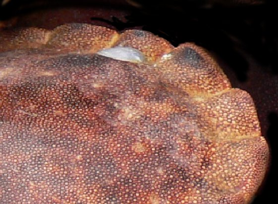 Détail du feston ornant la bordure d'un crabe Cancer pagurus dit "dormeur"